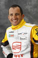 William David en championnat de France Supercopa Seat Leon 2010.